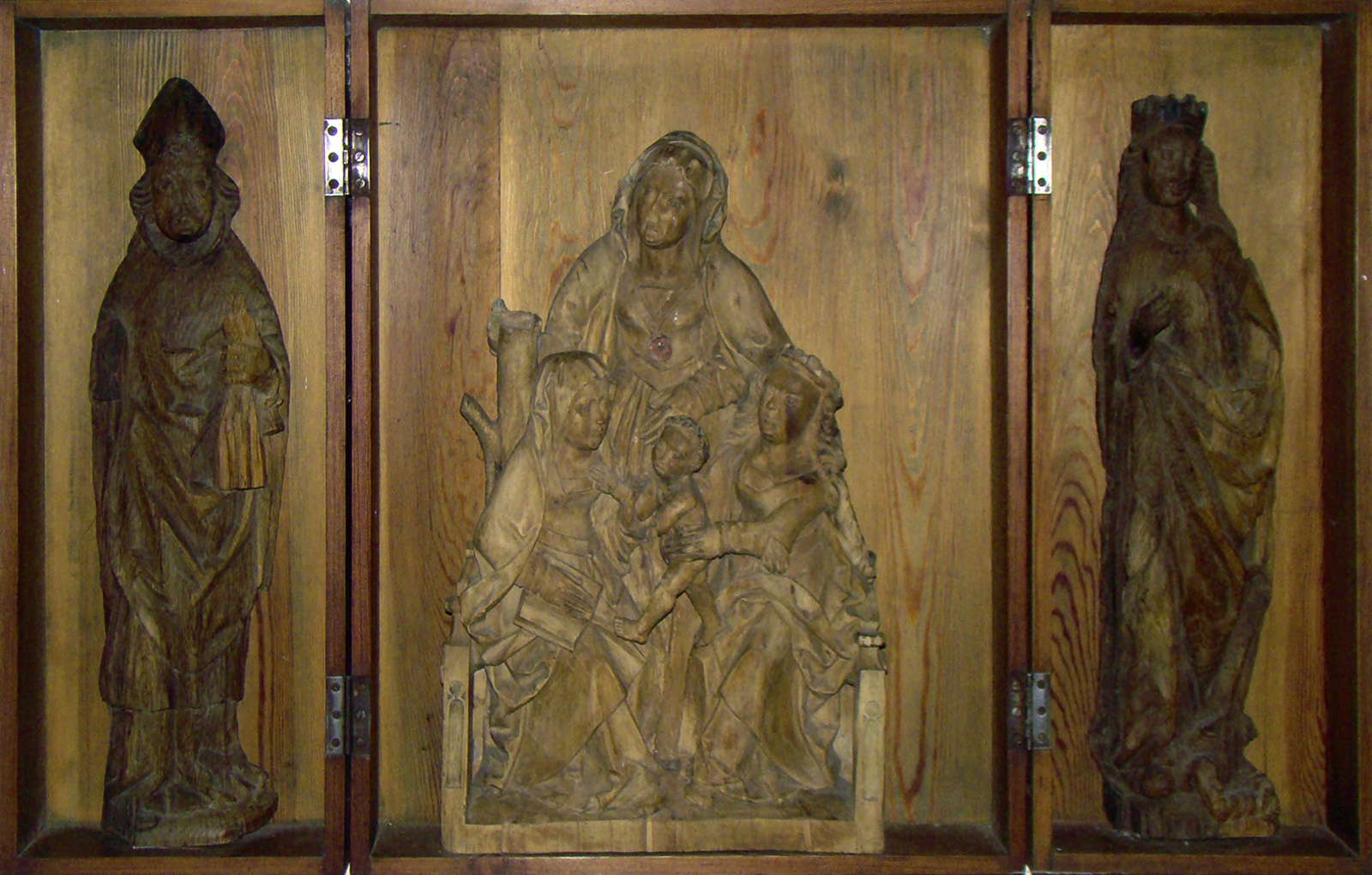 Klosterkirche Verchen, historische Schnitzfiguren eines Schnitzaltars aus dem 16. Jhd. Foto: Peter Schmelzle 2011.